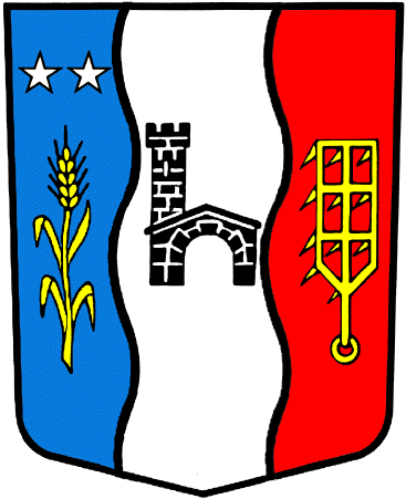 Wappen von Riddes Kanton Riddes Kanton Wallis